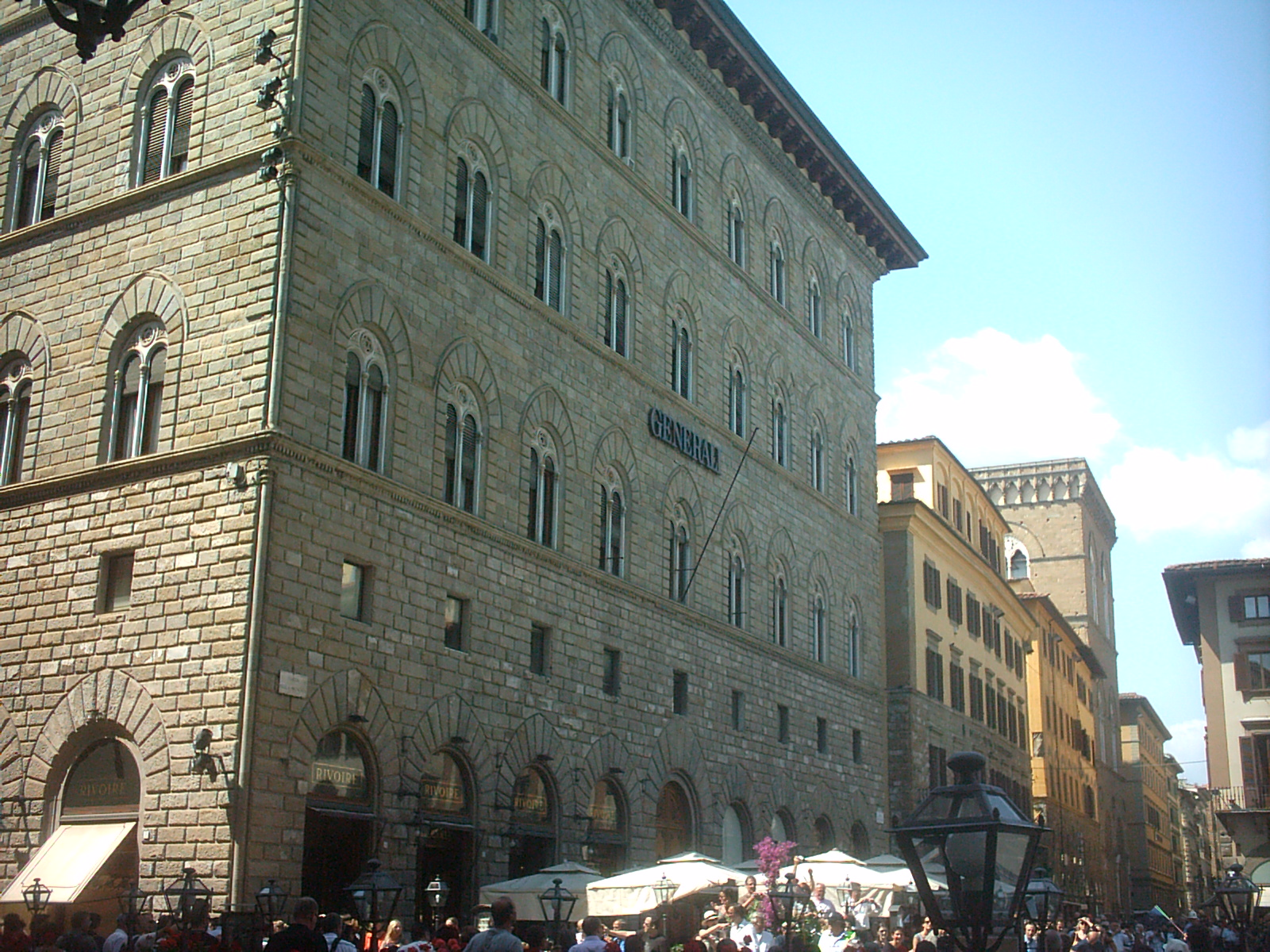 Palazzo delle Assicurazioni Generali a Firenze dove nel Trecento aveva sede l'antica Arte del Cambio, ora non più esistente